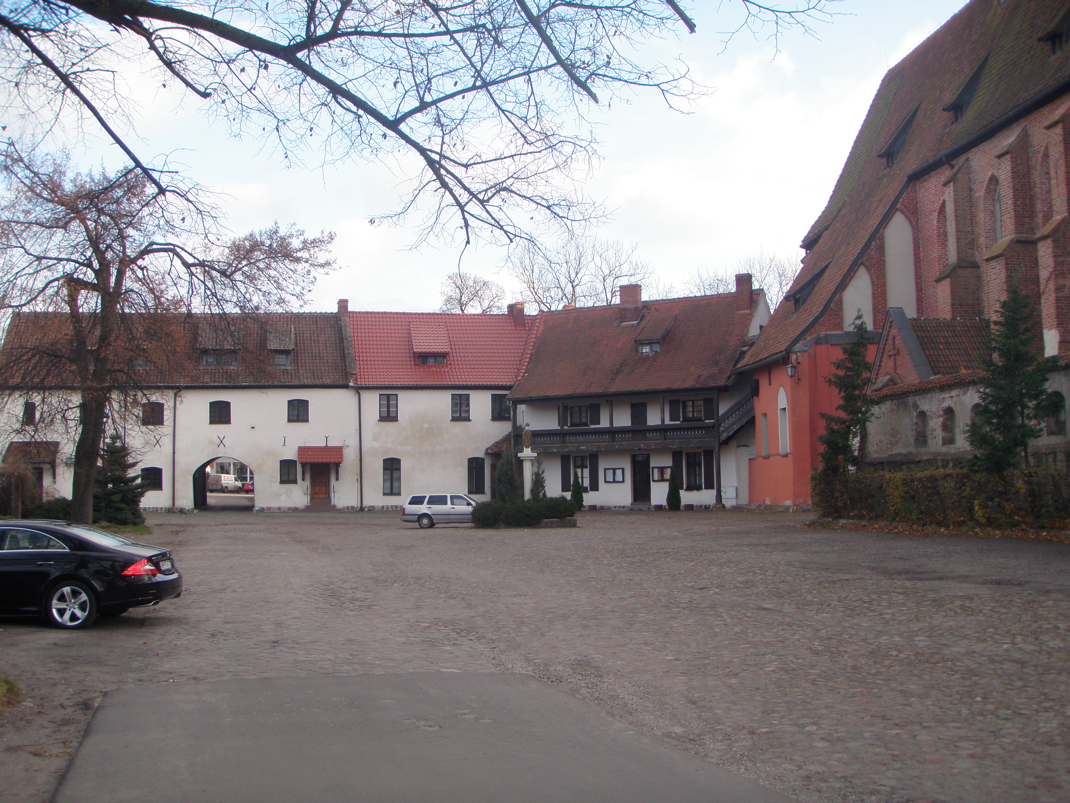 Żukowo - zespół klasztorny norbertanek, XIII, XVIII